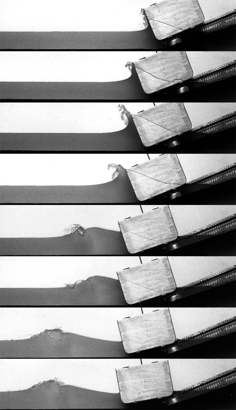 Querstapellauf 01 KMJ